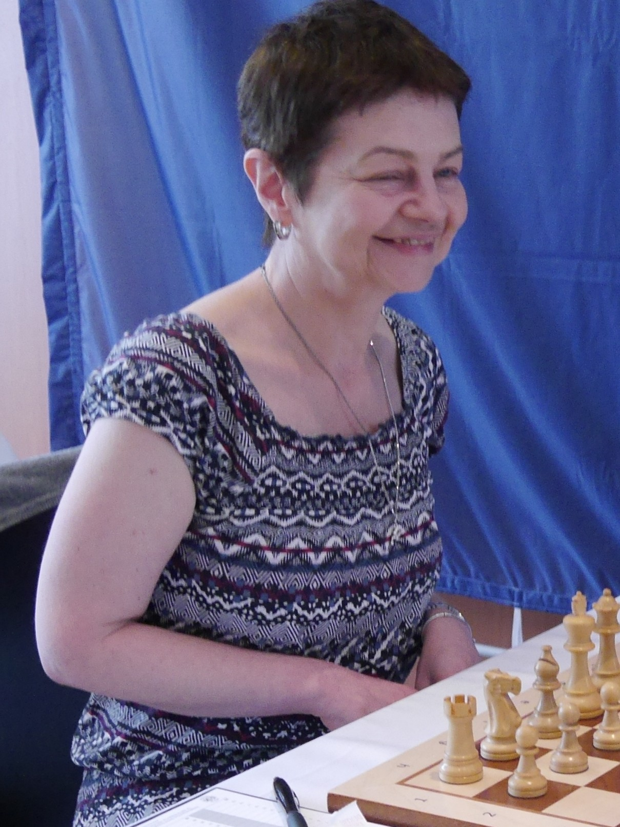 Zoya Schleining, GERMAN MASTERS 2016 in Dresden.